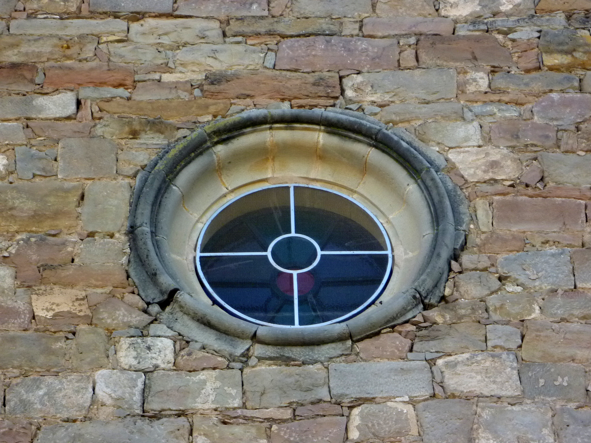 Convent dels Agustins del Pla (Sanaüja)